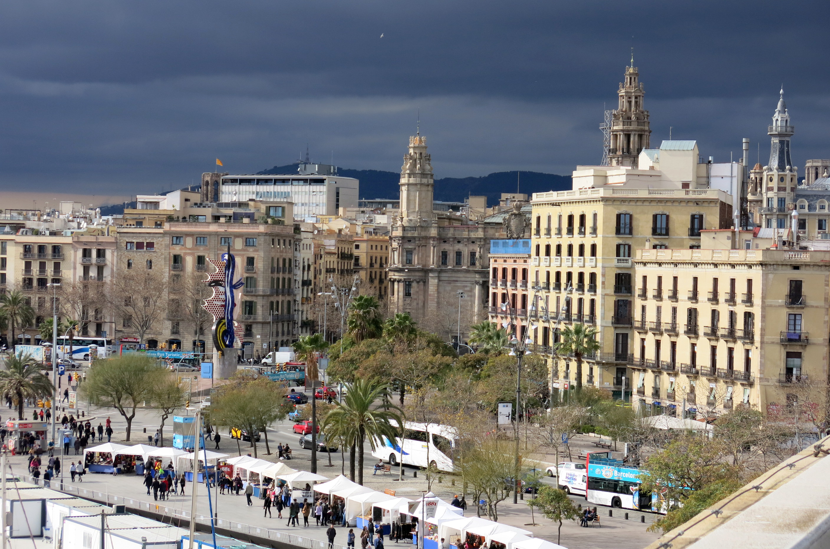 Edifici central de Correus i Telègrafs (Barcelona)